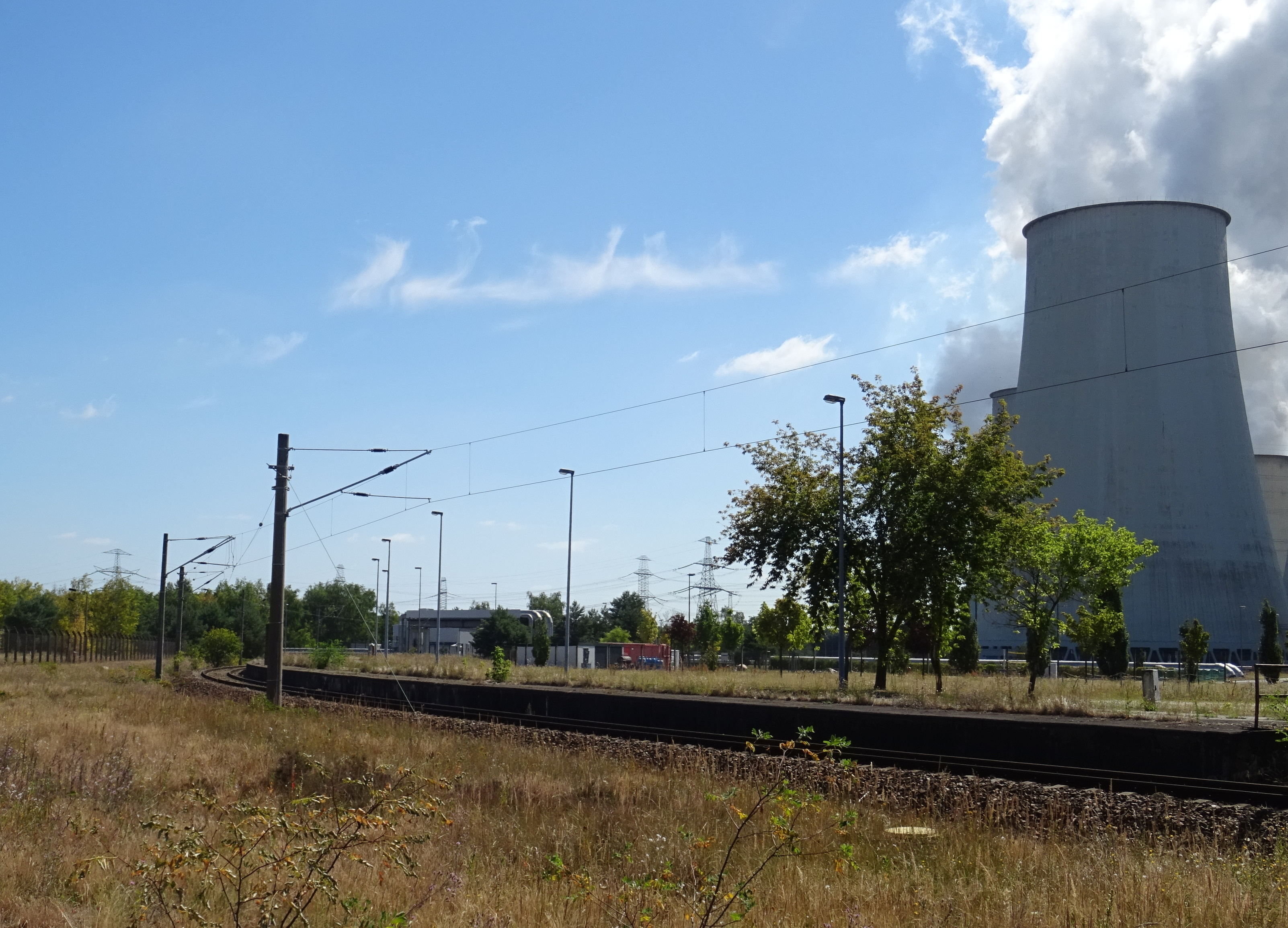 ehemaliger Haltepunkt Kraftwerk Jänschwalde West, betrieblich zum Bahnhof Peitz Ost gehörend